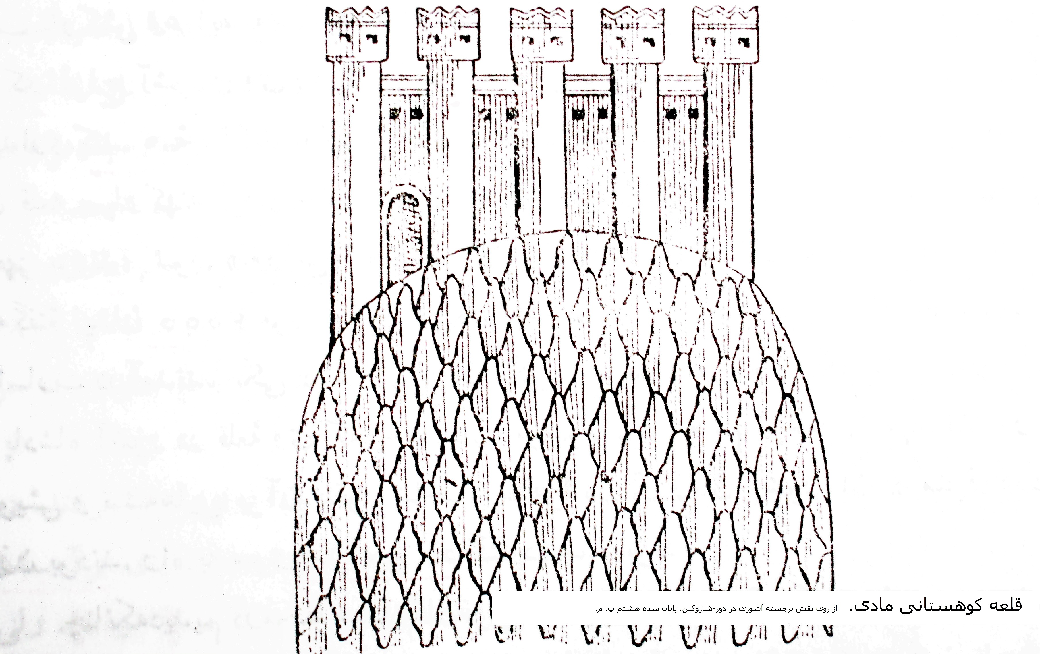 دژ کوهستنی مادی. از روی نقش برجسته آشوری در دور-شاروکین پایان سده هشتم